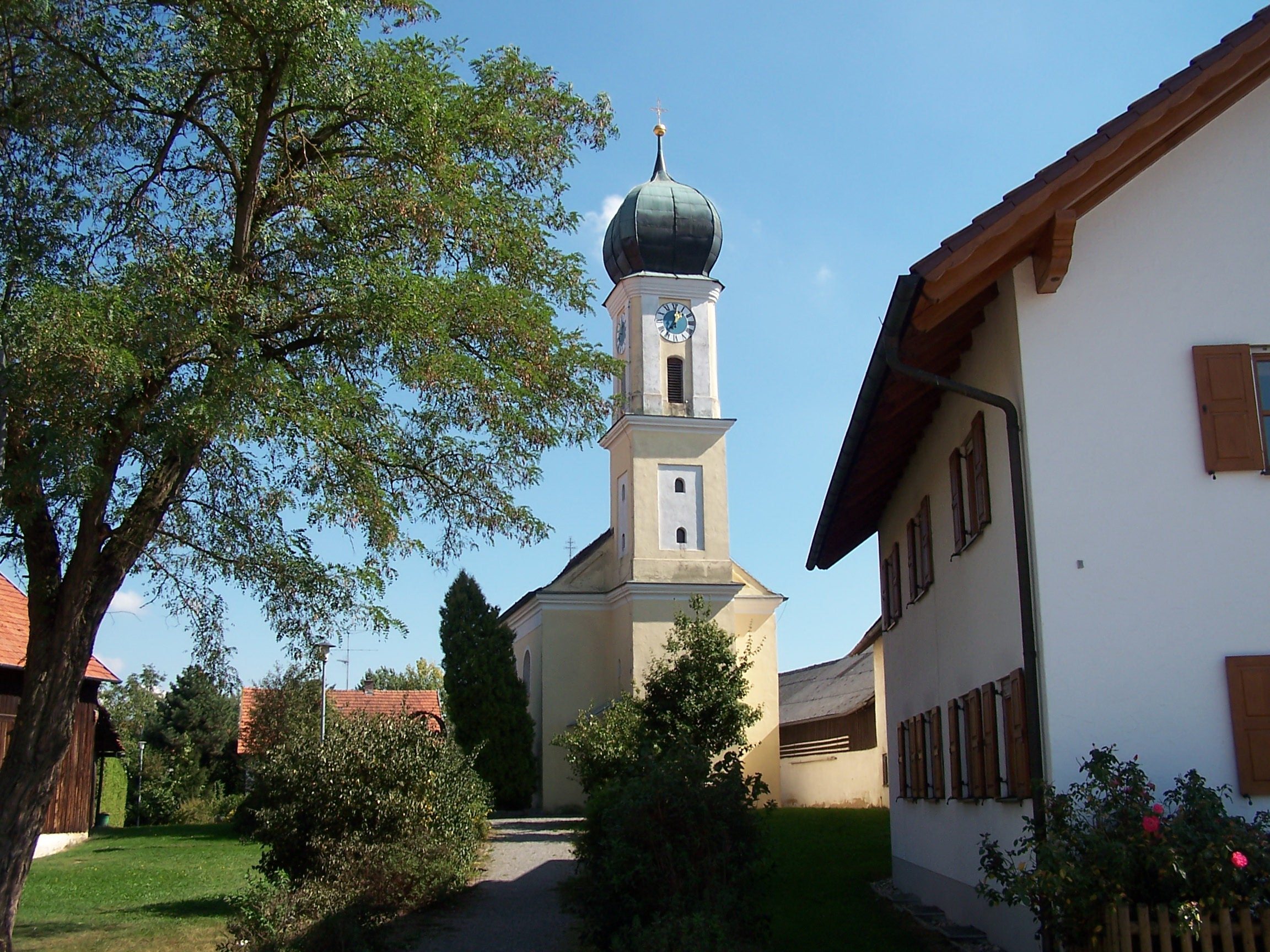 Dürnhart, Filialkirche St. Nikolaus